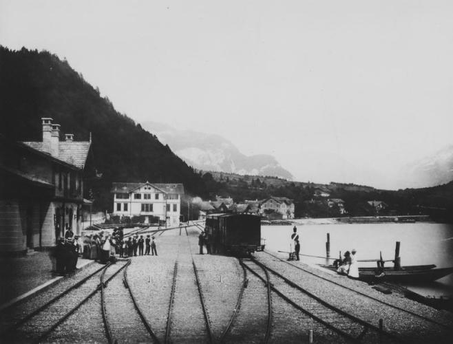 Bahnhof Brienz